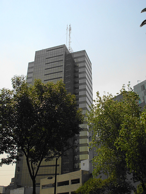 Torre Anáhuac en Ciudad de México.